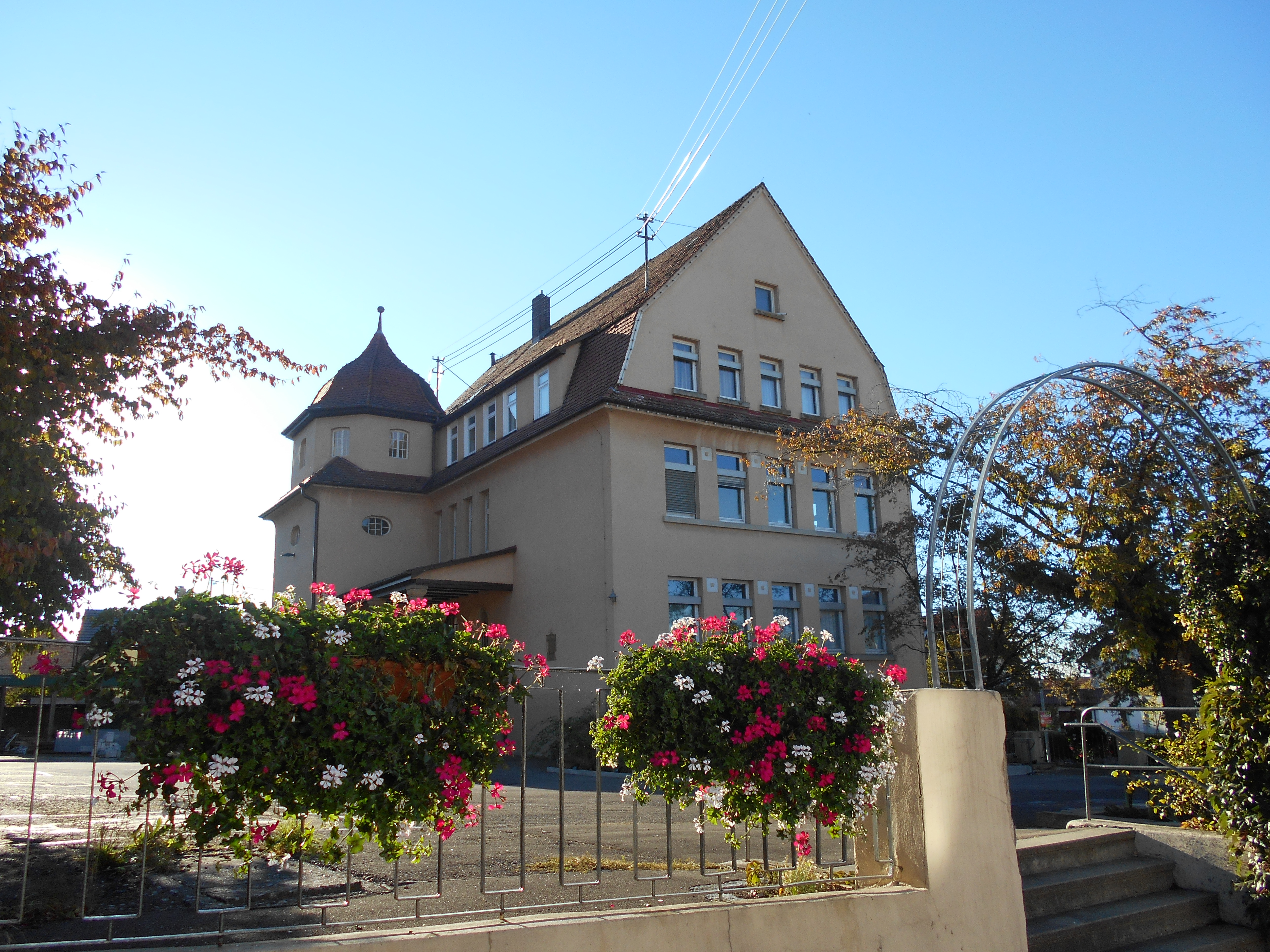 Das denkmalgeschützte Alte Schulhaus Bargau hat einen großen Schulhof und hat seit dem Umbau Veranstaltungs- und Tagungsräume, sowie Apartments. Ebenso bietet es Übernachtungsmöglichkeiten für Pilger an.